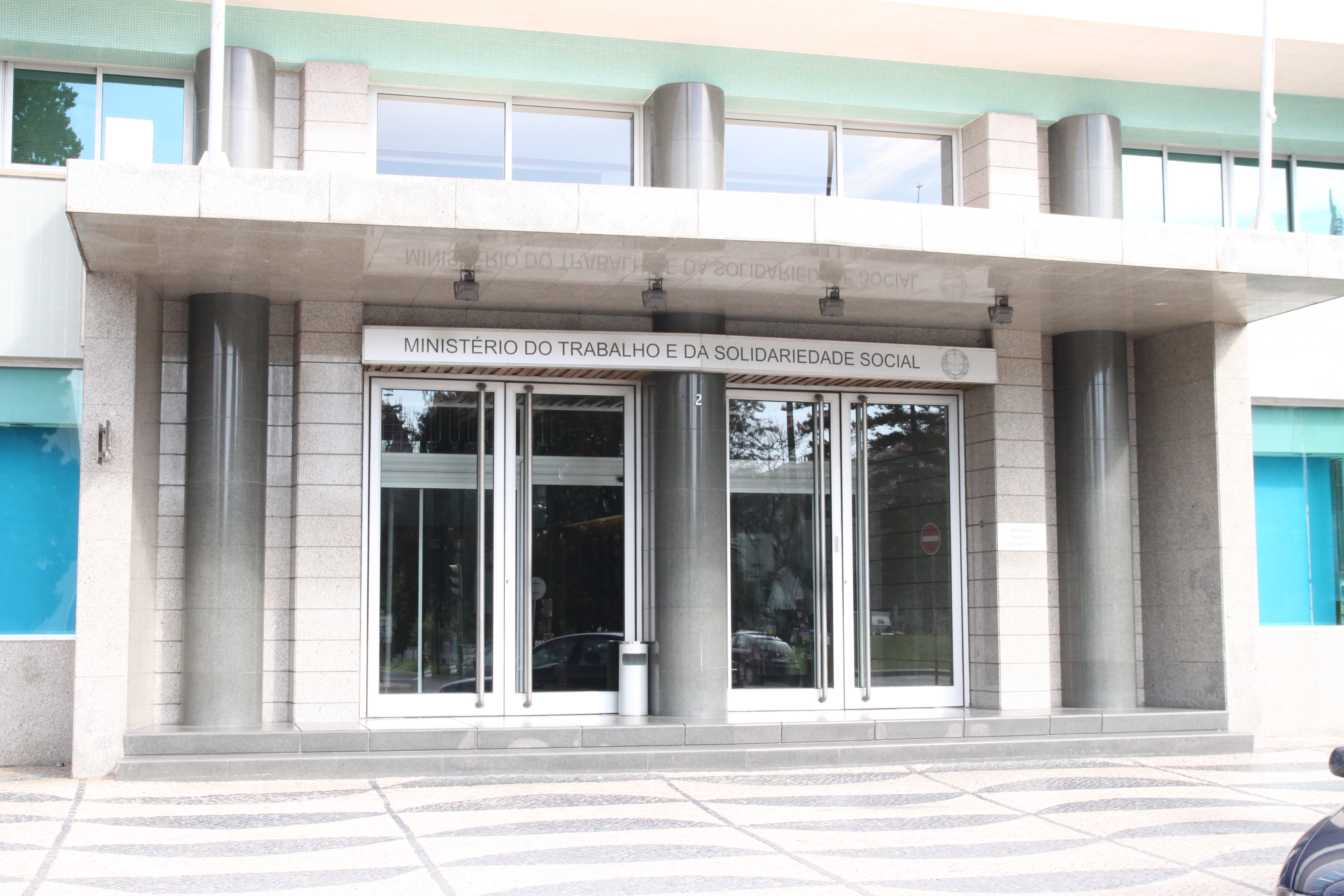 Edifício do Ministério do Trabalho e Segurança Social This file was uploaded for Wiki Loves Monuments in Portugal with the unique identifier 97024285.